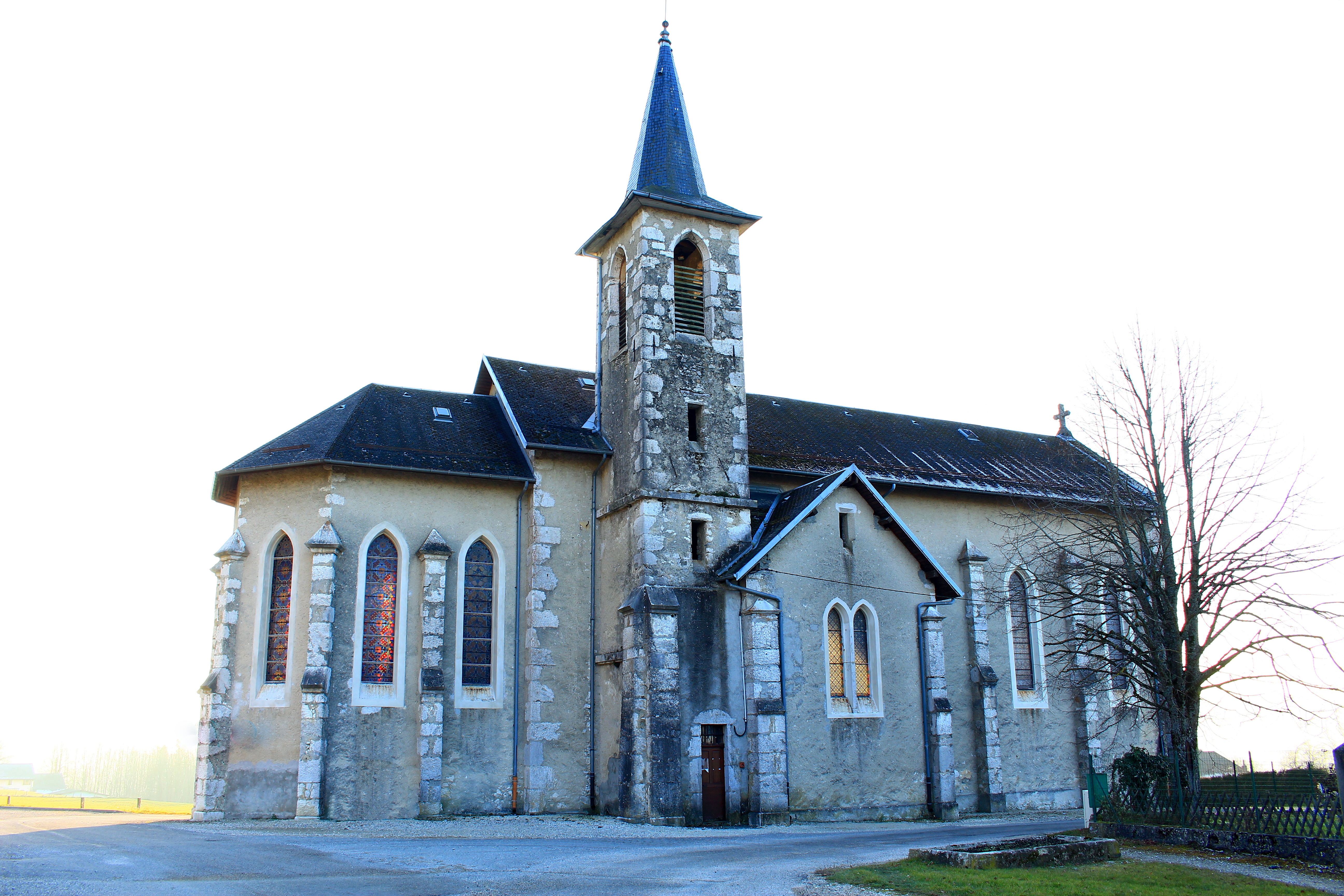 L'église de La Bauche (Savoie), construite en 1875. Décembre 2016